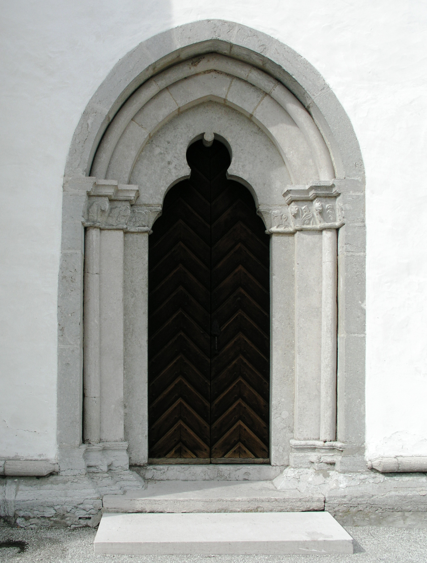 Othem kyrka / Othem church, Gotland, Sweden